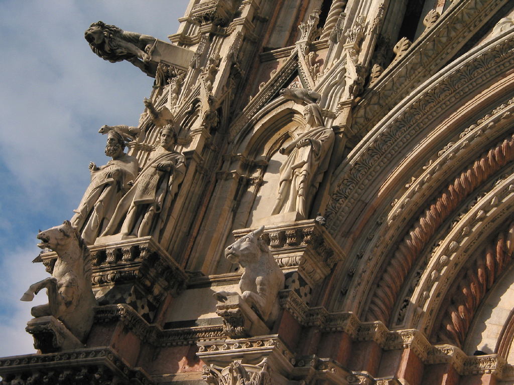 Duomo di Siena, facade - detail